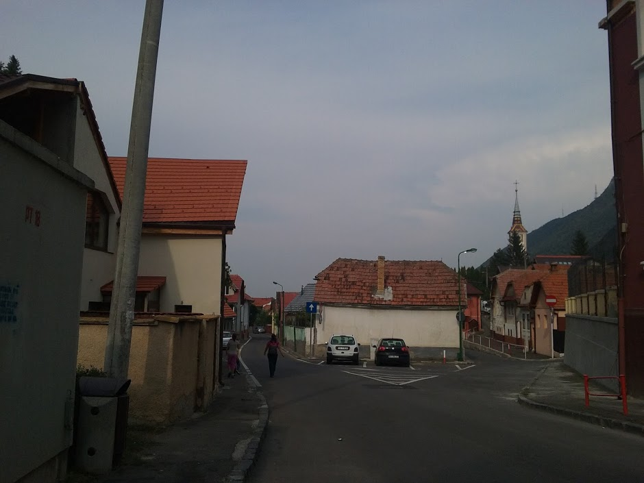 Ansamblul bisericii Sf. Treime - Pe Tocile, municipiul Brașov, Str. Saftu Vasile Dr. 57 sec. XIX - XX